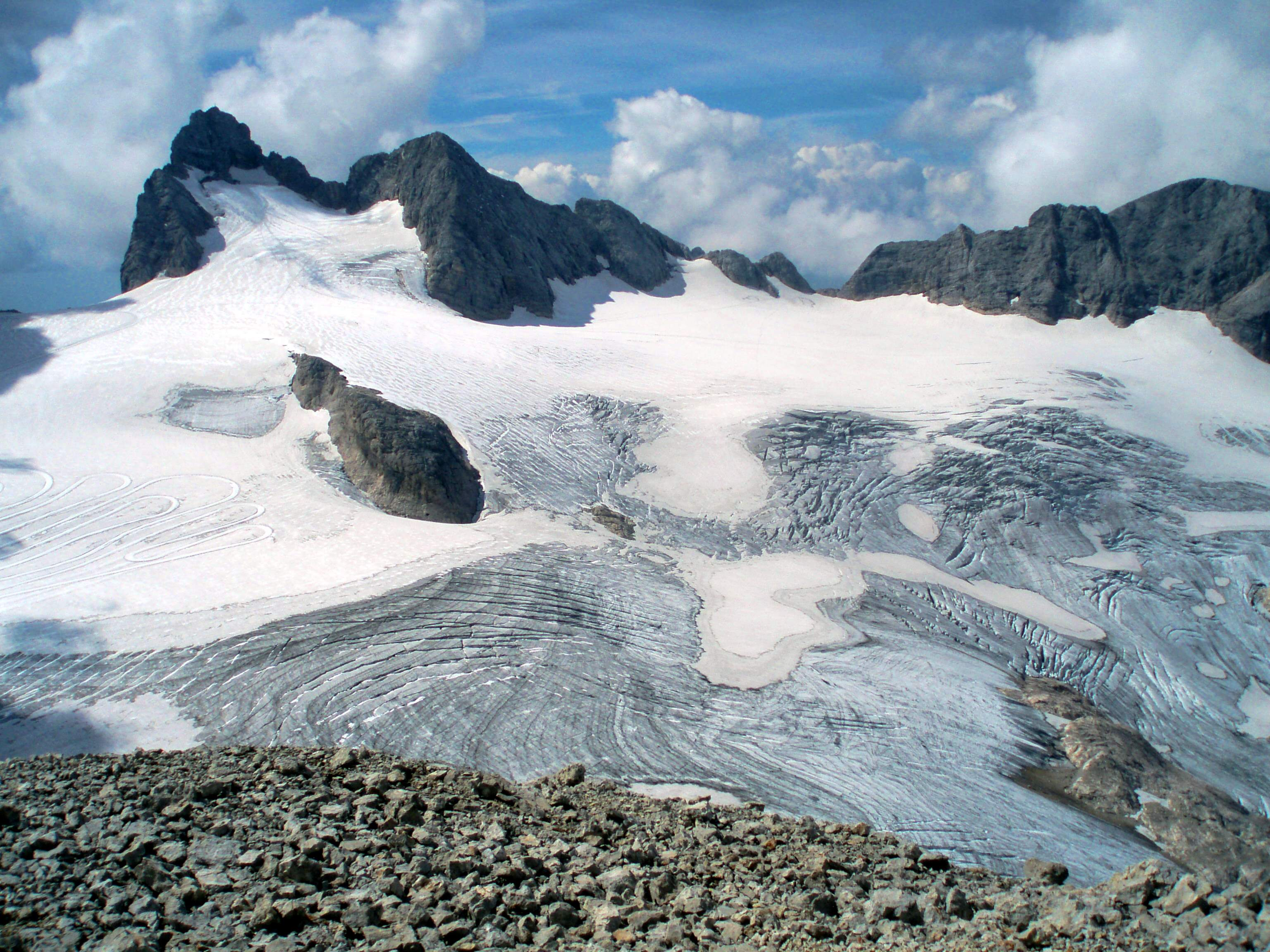 Blick zum Hallstätter Gletscher und Hohen Dachstein